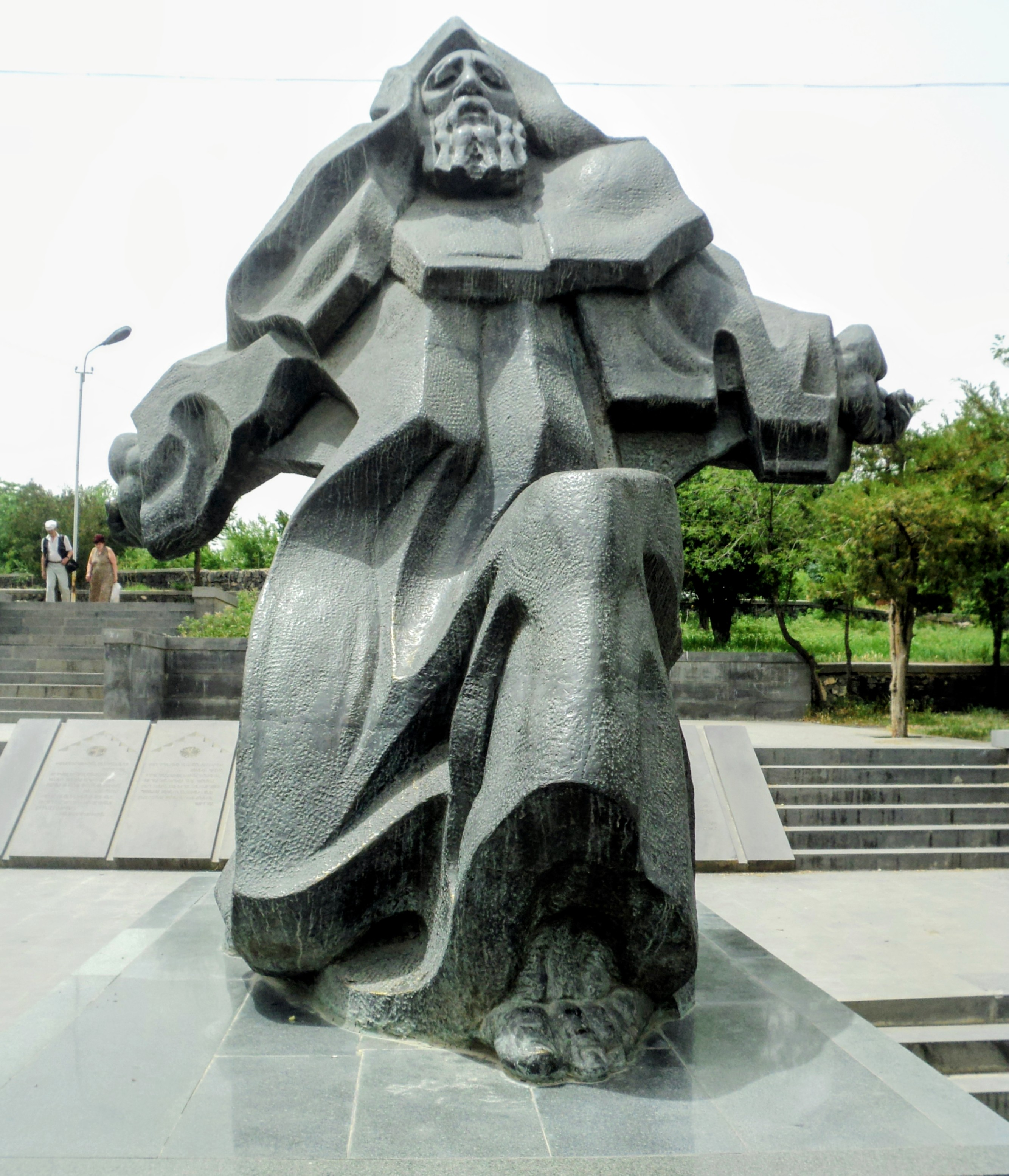 Բանաստեղծ, փիլիսոփա, երաժիշտ, մանկավարժ. աստվածաբանական և եկեղեցական գործիչ Խոսրով Անձևացու որդին: Նարեկացու արձանը կերտվել է 2002 թ. ապրիլի 19-ին: 2003 թ. ՅՈՒՆԵՍԿՕ-ի որոշմամբ նշվեց Նարեկացու ՙՄատյան ողբերգության՚ պոեմի 1000-ամյակը: Հուշարձանի ճարտարապետը արձանի մոտ տեղադրված 7 բազալտե սալաքարերը վերածել է Մատյանի, որոնց վրա փորագրված են հատվածներ Նարեկացու ՙՄատյան ողբերգության՚ պոեմից: Արձանի նյութը՝ բրոնզ, գրանիտ, բազալտ, քանդակի բարձրությունը` 3,25 մ, լայնությունը (թևերի բացվածքը)` 2,8 մ, քանդակագործ` Սերժ Մեհրաբյան, ճարտարապետ` Աշոտ Սմբատյան: 7/3